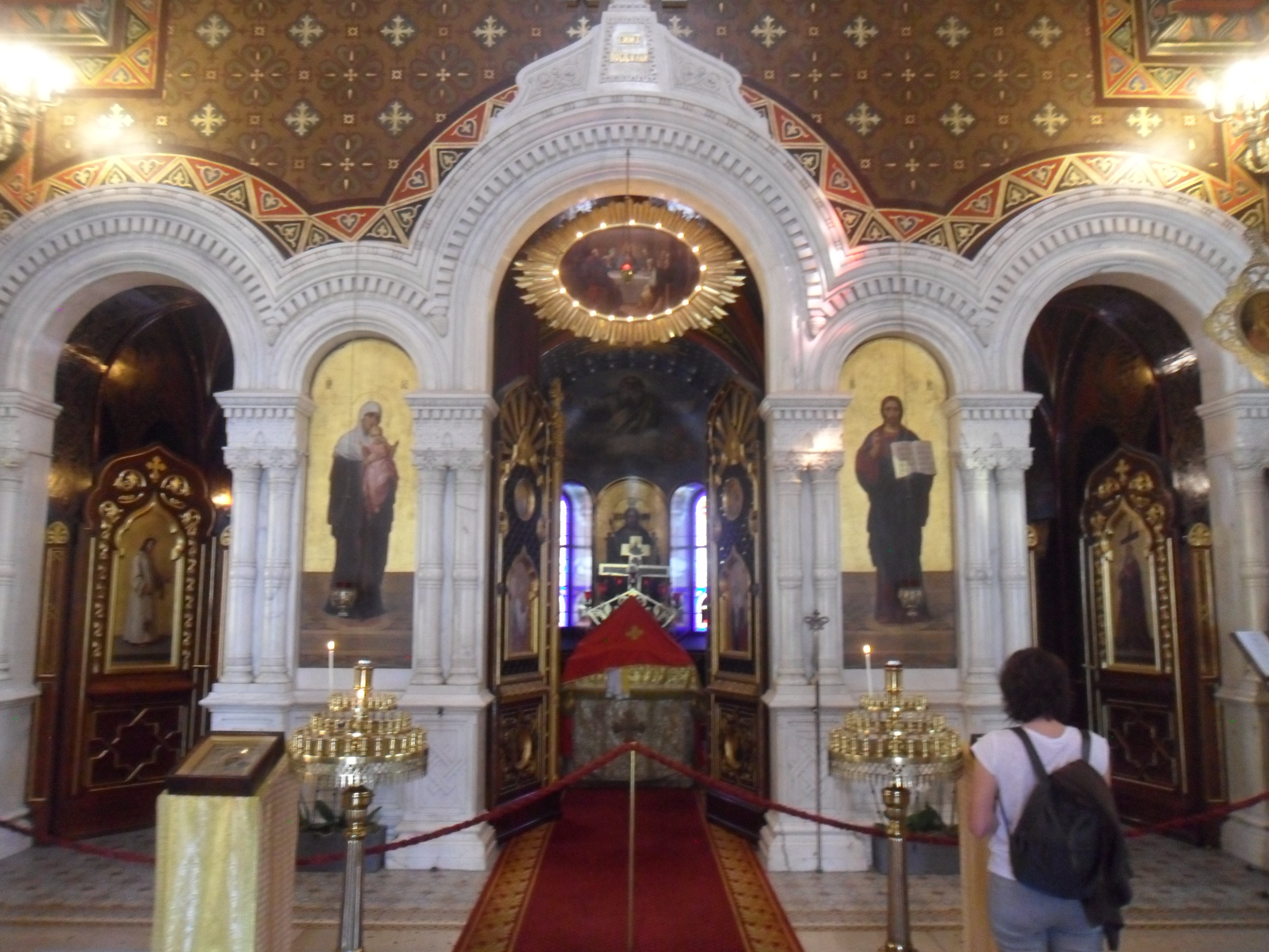 Nef de l'Église russe de Genève